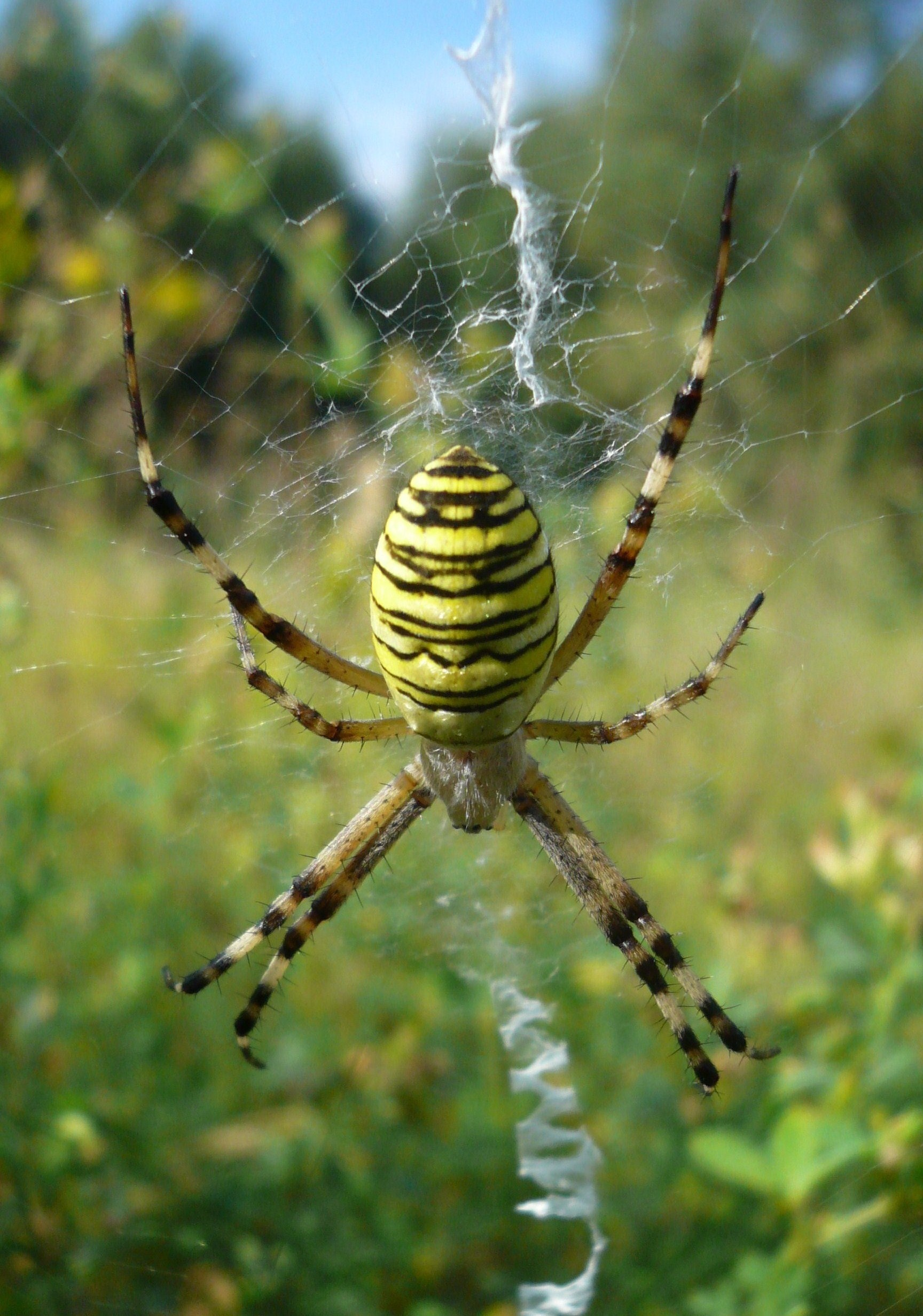 Samica tygrzyka na poligonie WAT